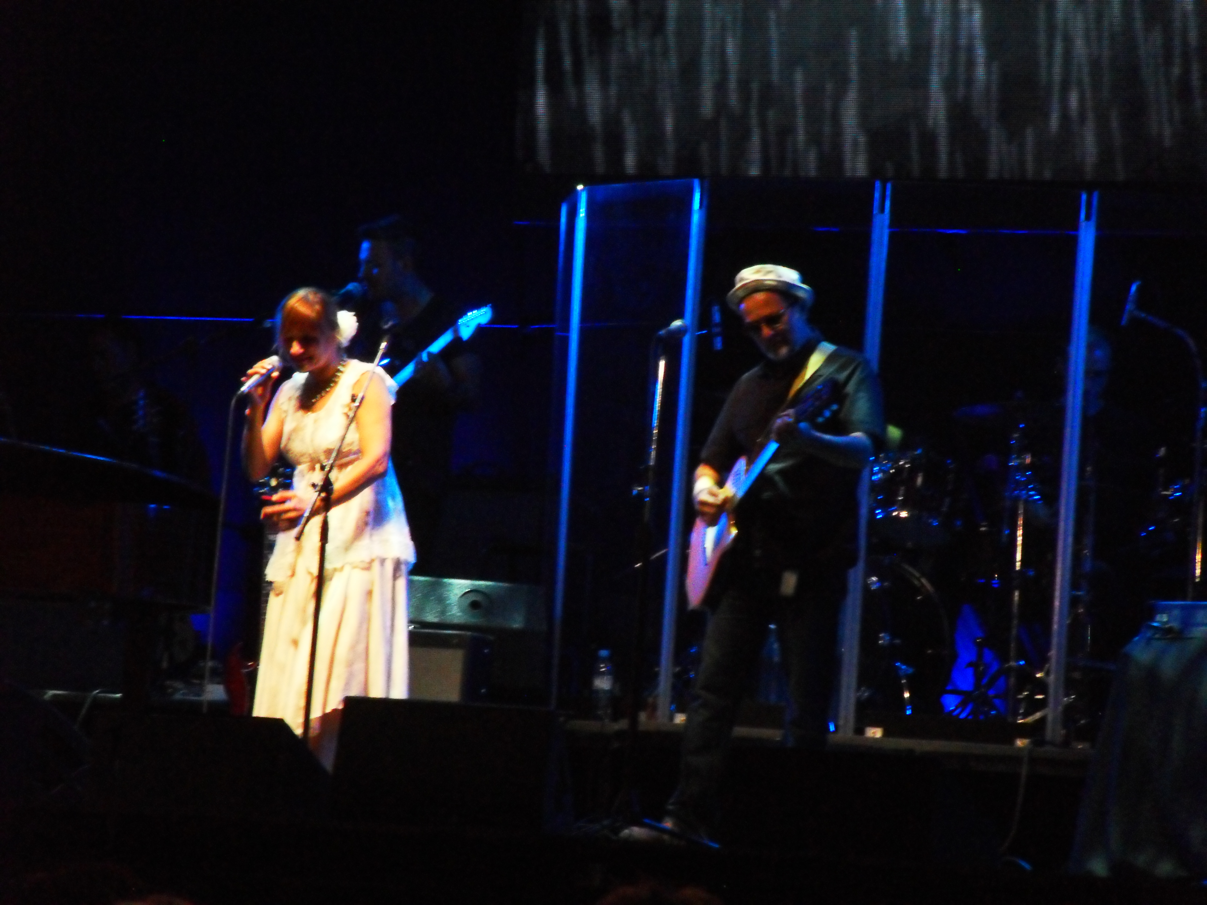 El dúo de pop rock Man Ray